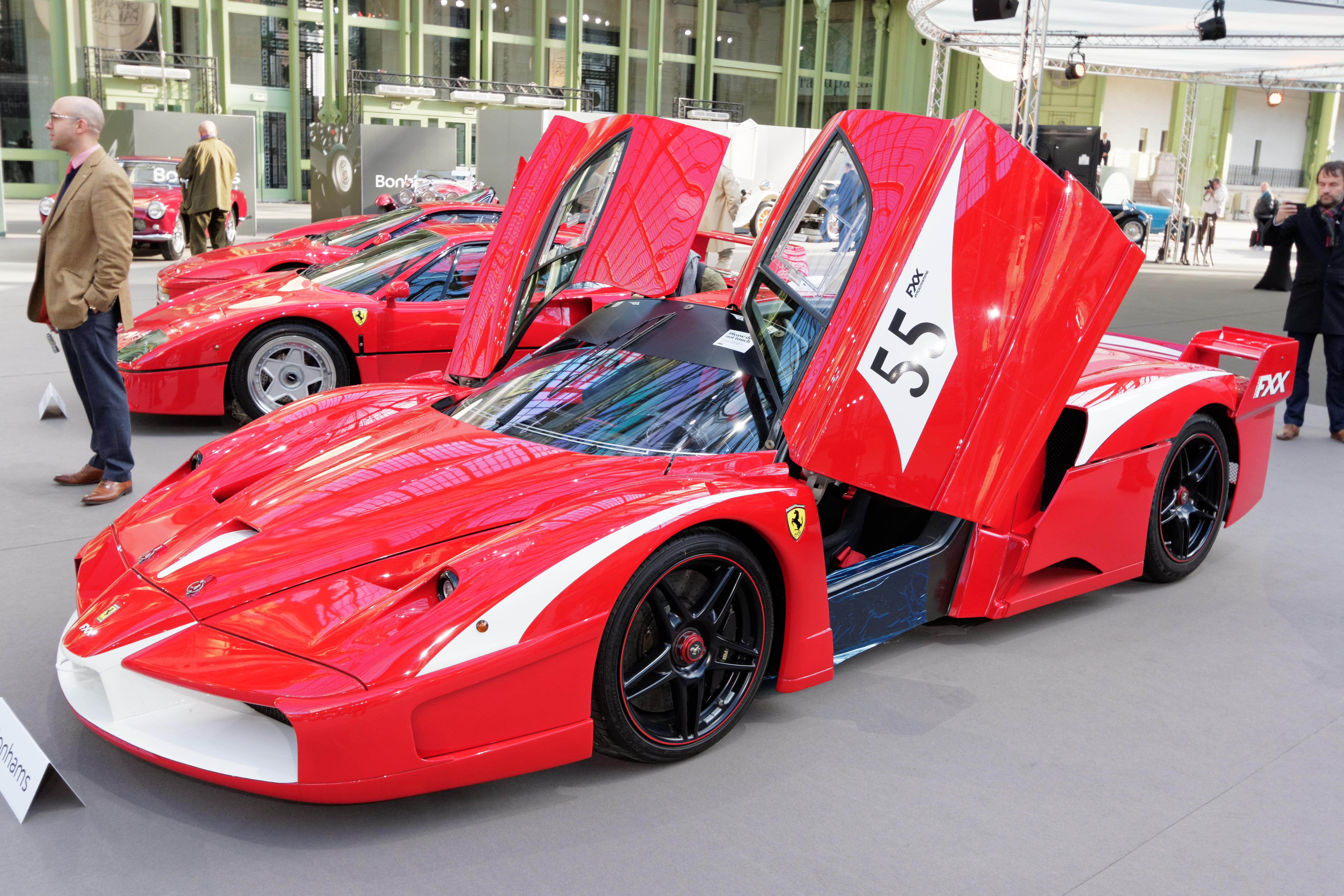 Un des véhicules présenté lors de la vente aux enchères Bonhams 2015 au Grand Palais de Paris.